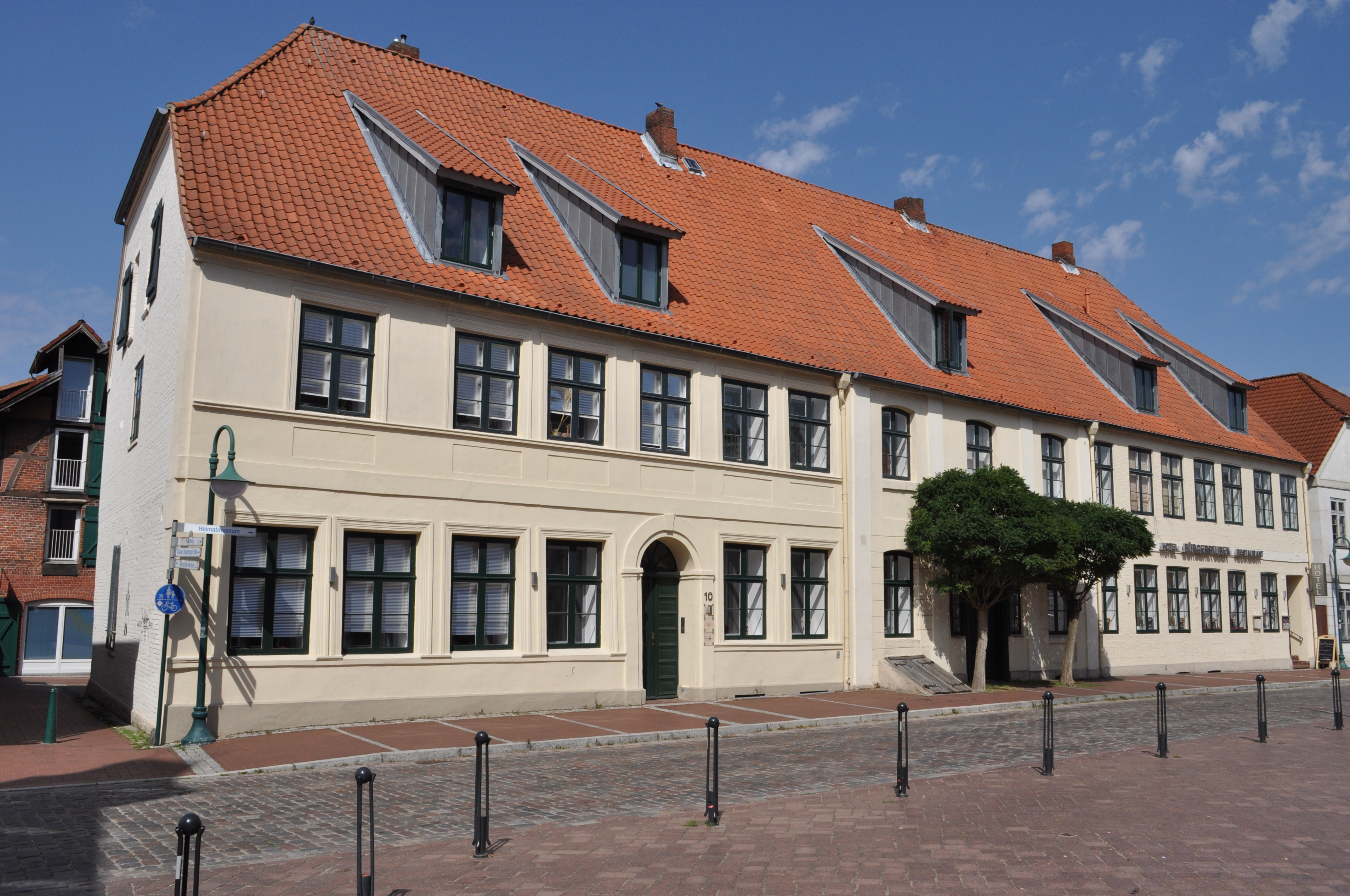 Hotel Bürgerstuben, Lübecker Straße 10, 12a in Bad Segeberg. This is a photograph of an architectural monument.